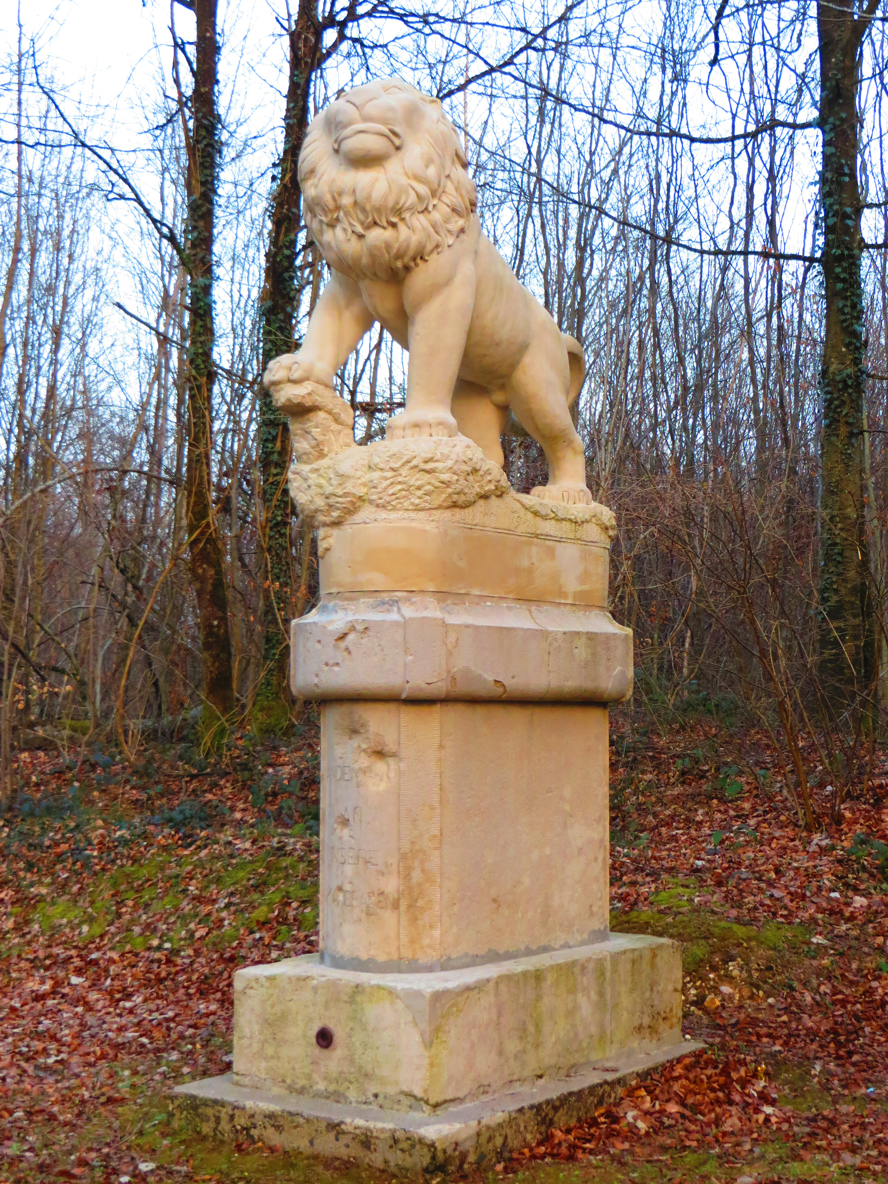 Le lion commémorant l'assaut des troupes bavaroises sur le fort du Camp des romains en septembre 1914, édifié en 1916 à Varvinay.